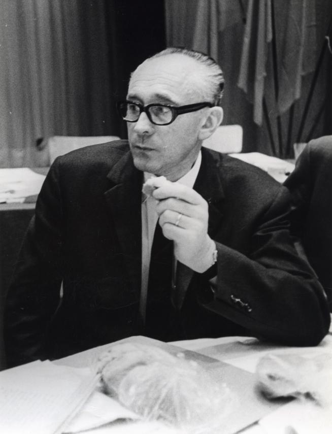 J.G.H. Tans (P.v.d.A.). Nederland, ca. 1969.